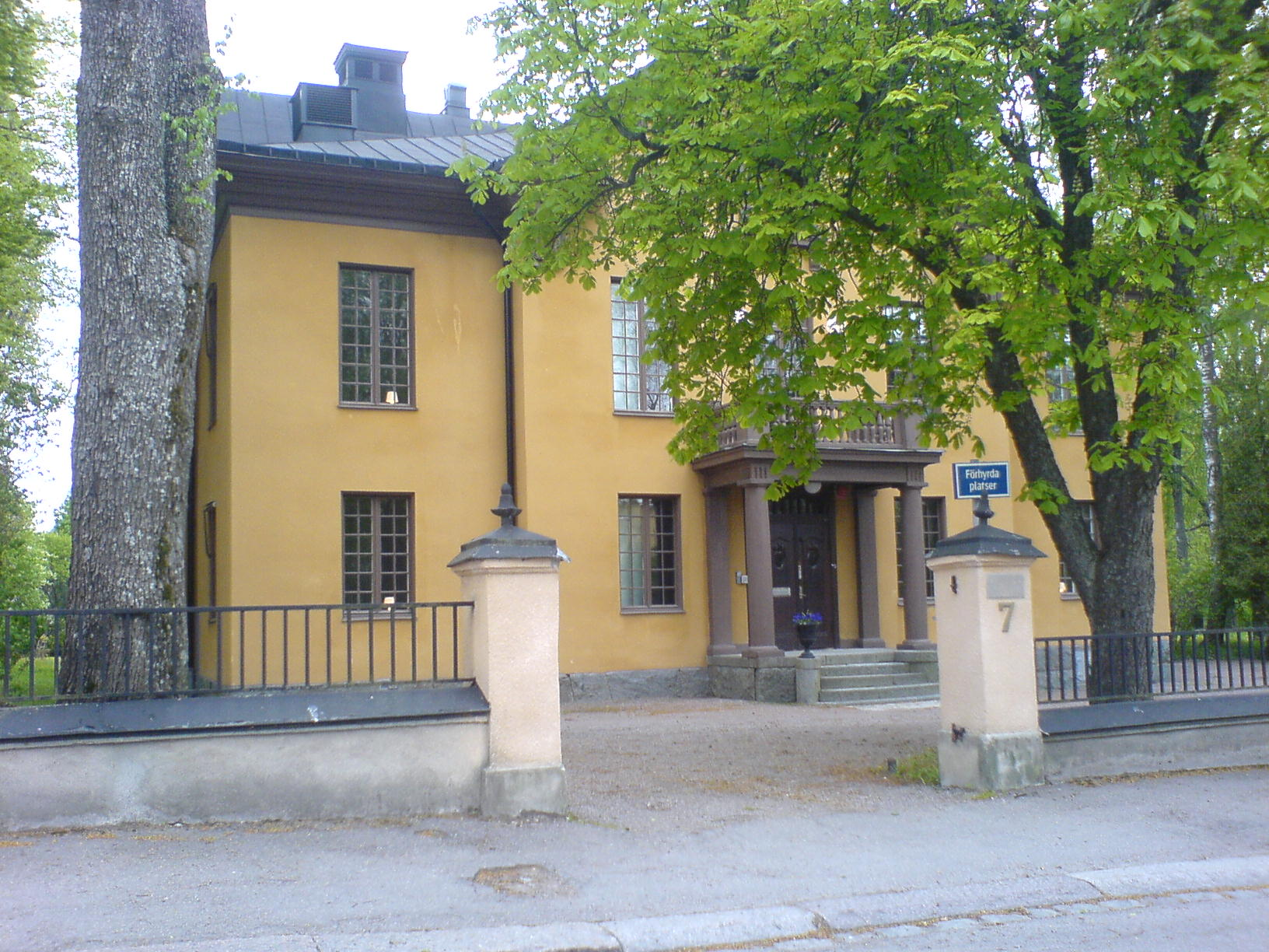 villa i kåbo i äldre område